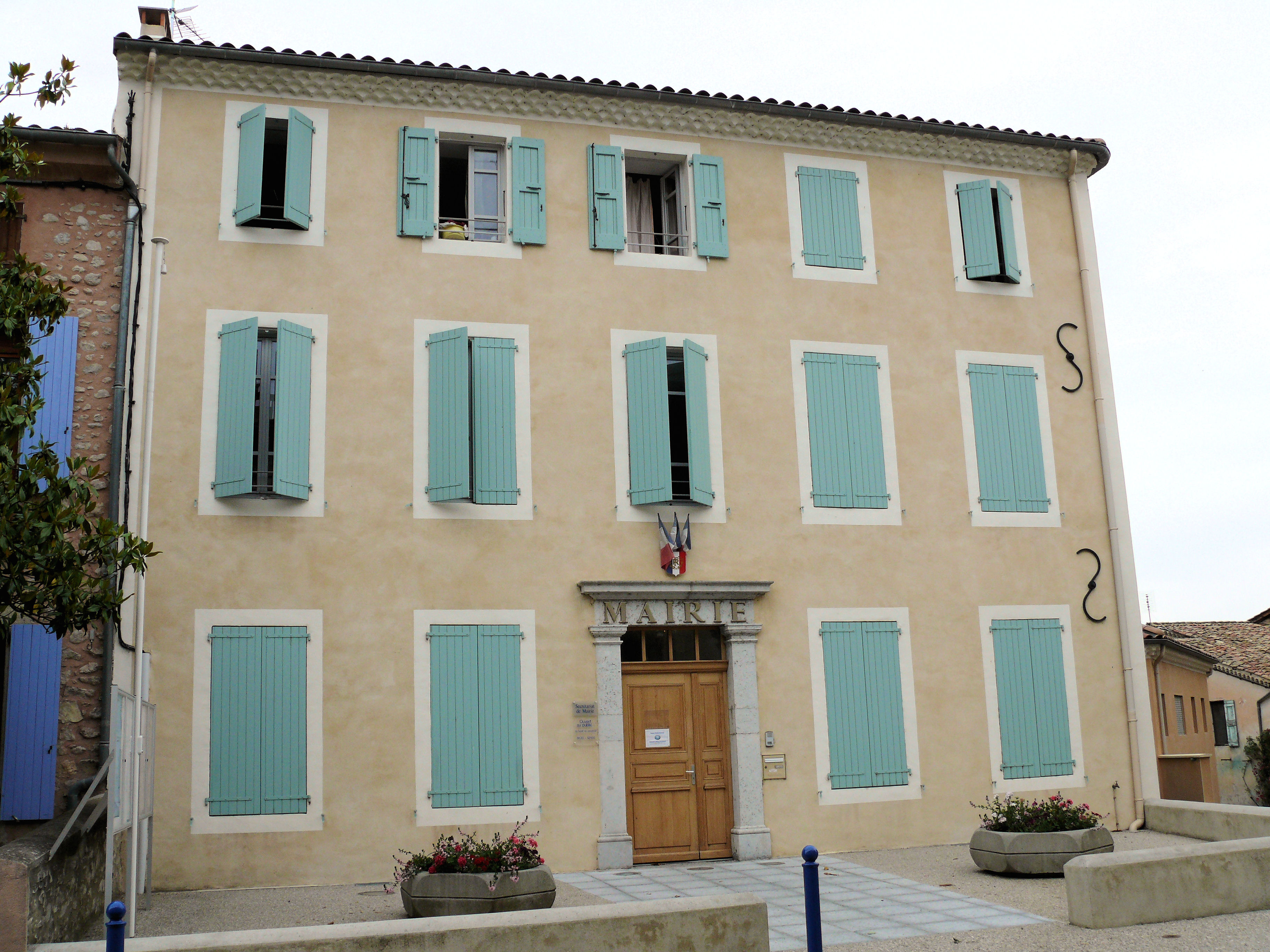 Luc-en-Diois - Mairie